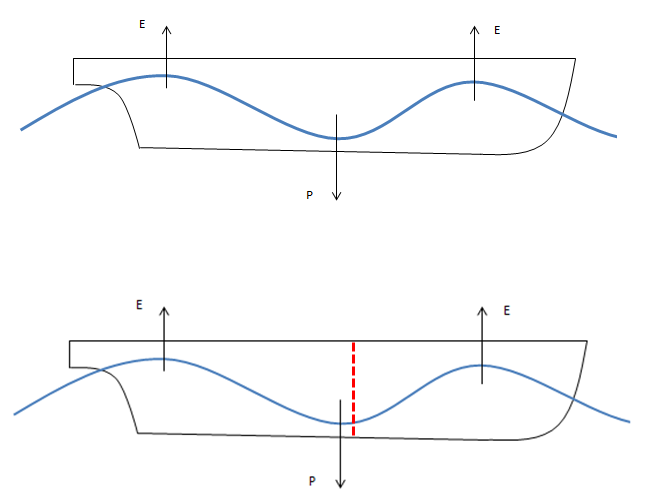 Arrufoa olatuen ondorioz